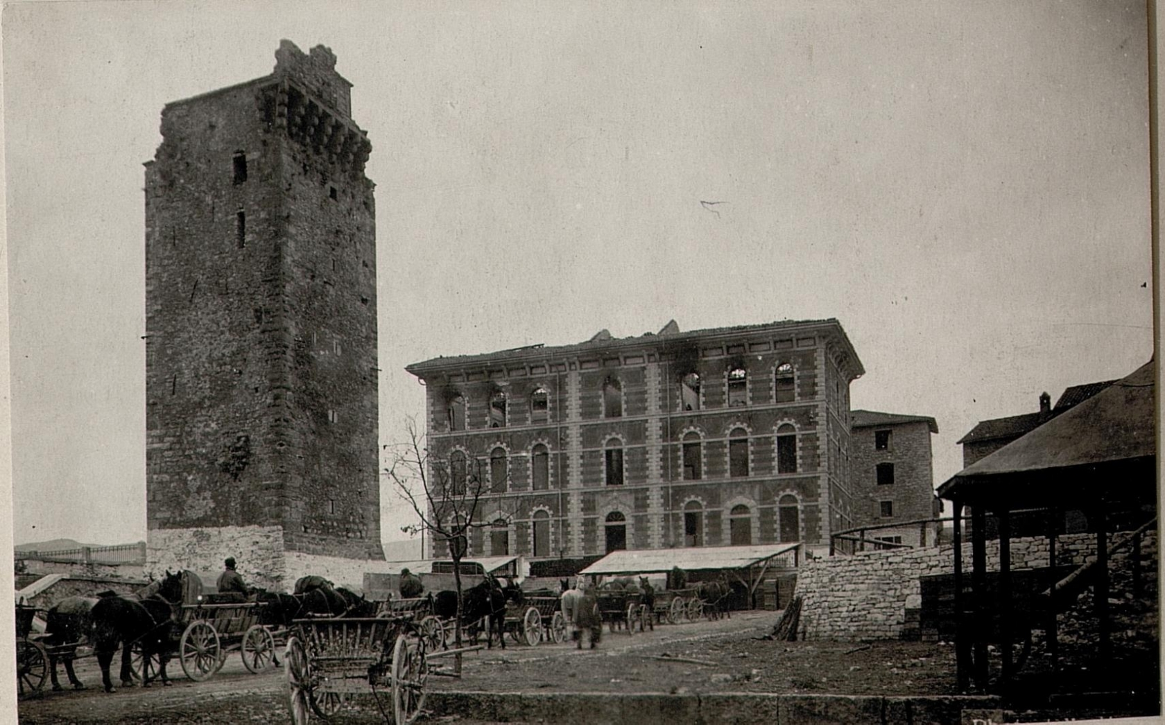 Enego.Hauptstraße.